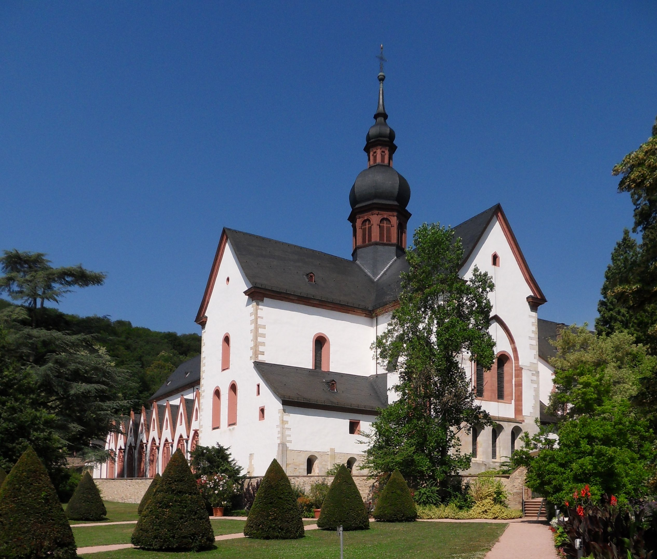 Basilika von Kloster Eberbach, Blick von Südosten